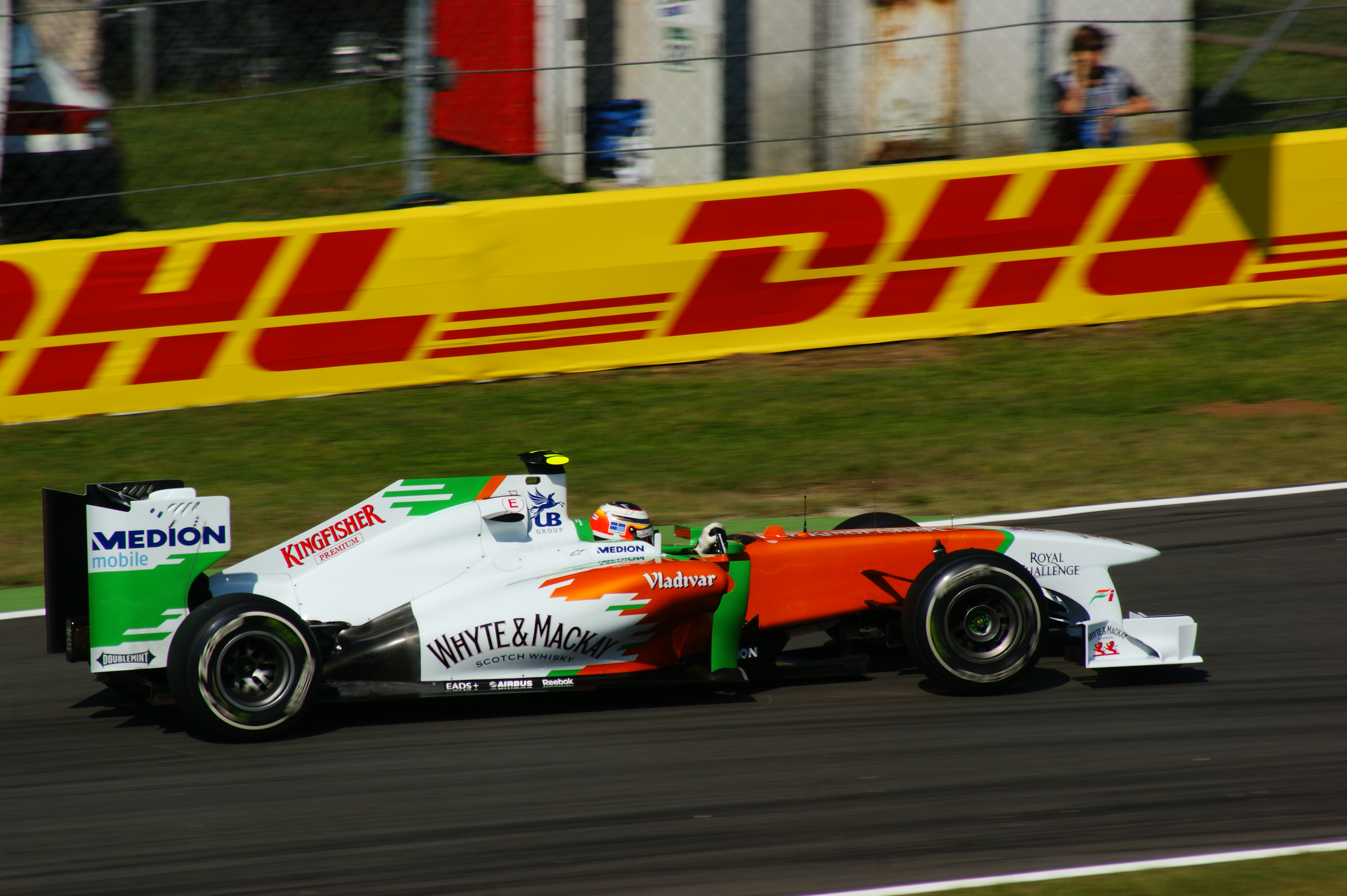 Paul Di Resta alla prima variante Monza 2011